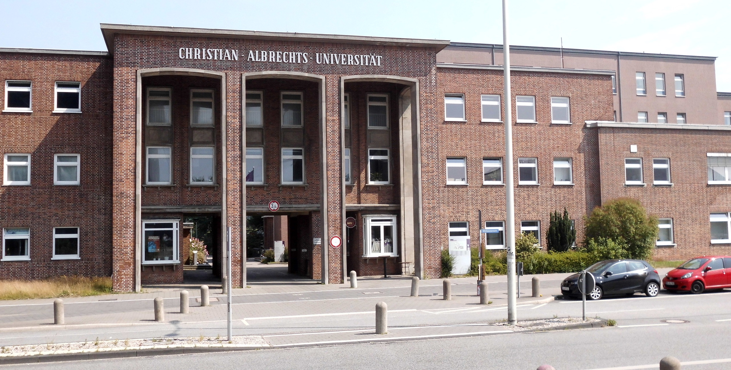 Zugang zum Campusgelände der CAU im Kieler Stadtteil Ravensberg.